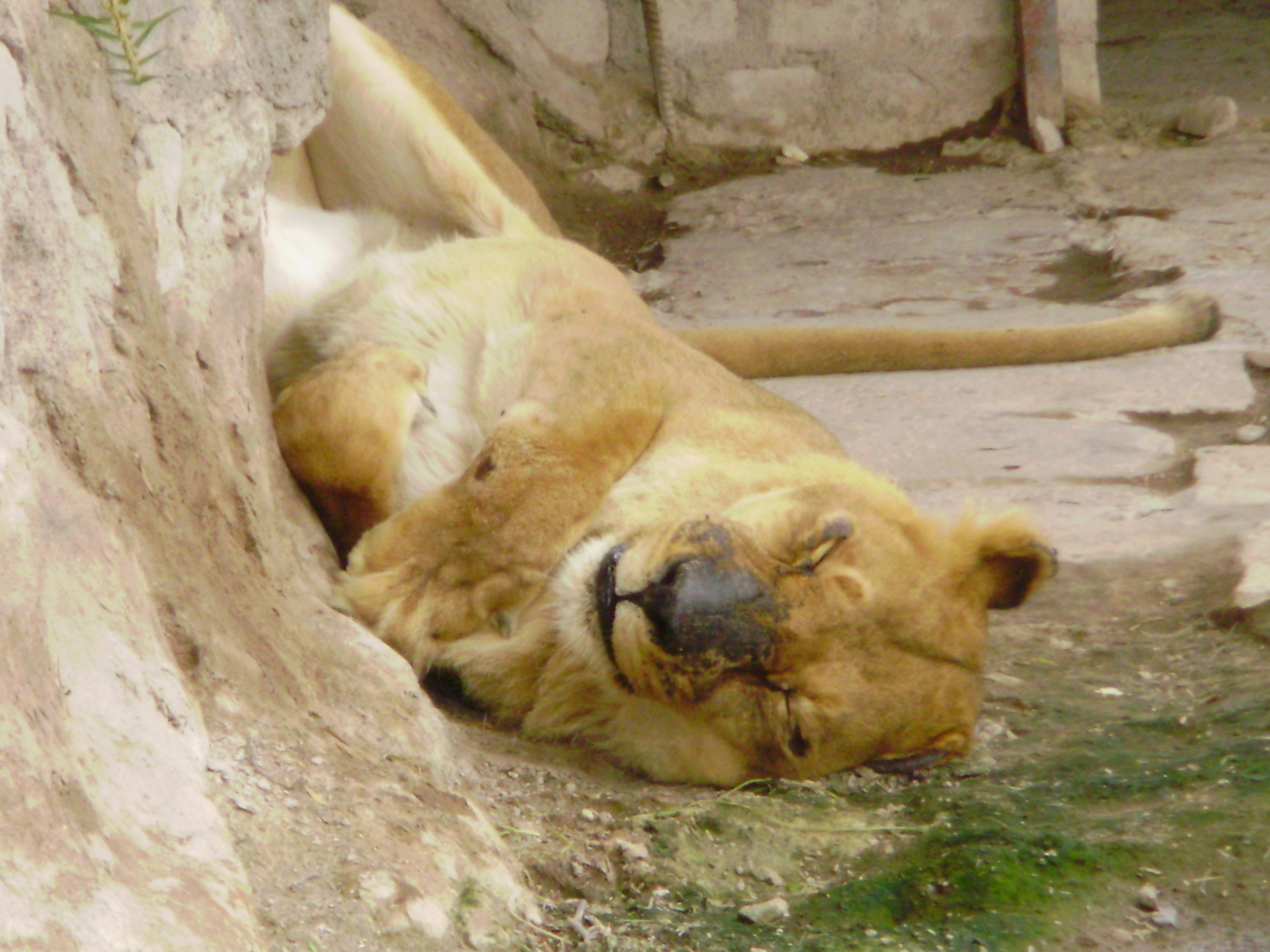 Foto de una leona en el zoológico de la Universidad Nacional San Cristóbal de Huamanga, en Ayacucho, Perú.